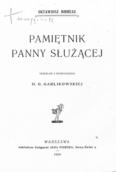 couverture de la traduction polonaise de Le Journal d'une femme de chambre, Dziennik panny służącej d'Octave Mirbeau (1848-1917)